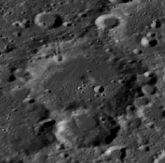 Cráter Chapman (LRO)